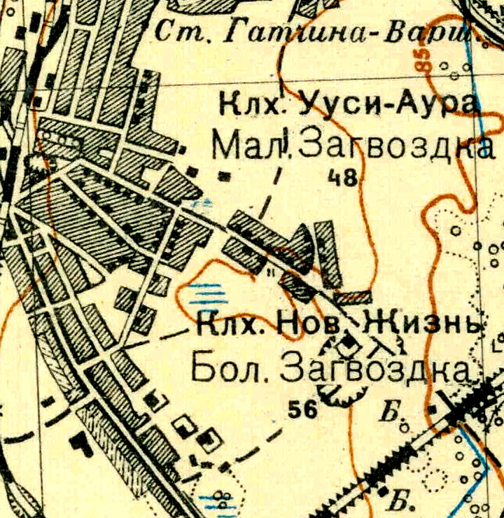 Топографическая карта Ленинградской области, квадрат О-36-13-А-г, деревни Большая и Малая Загвоздка